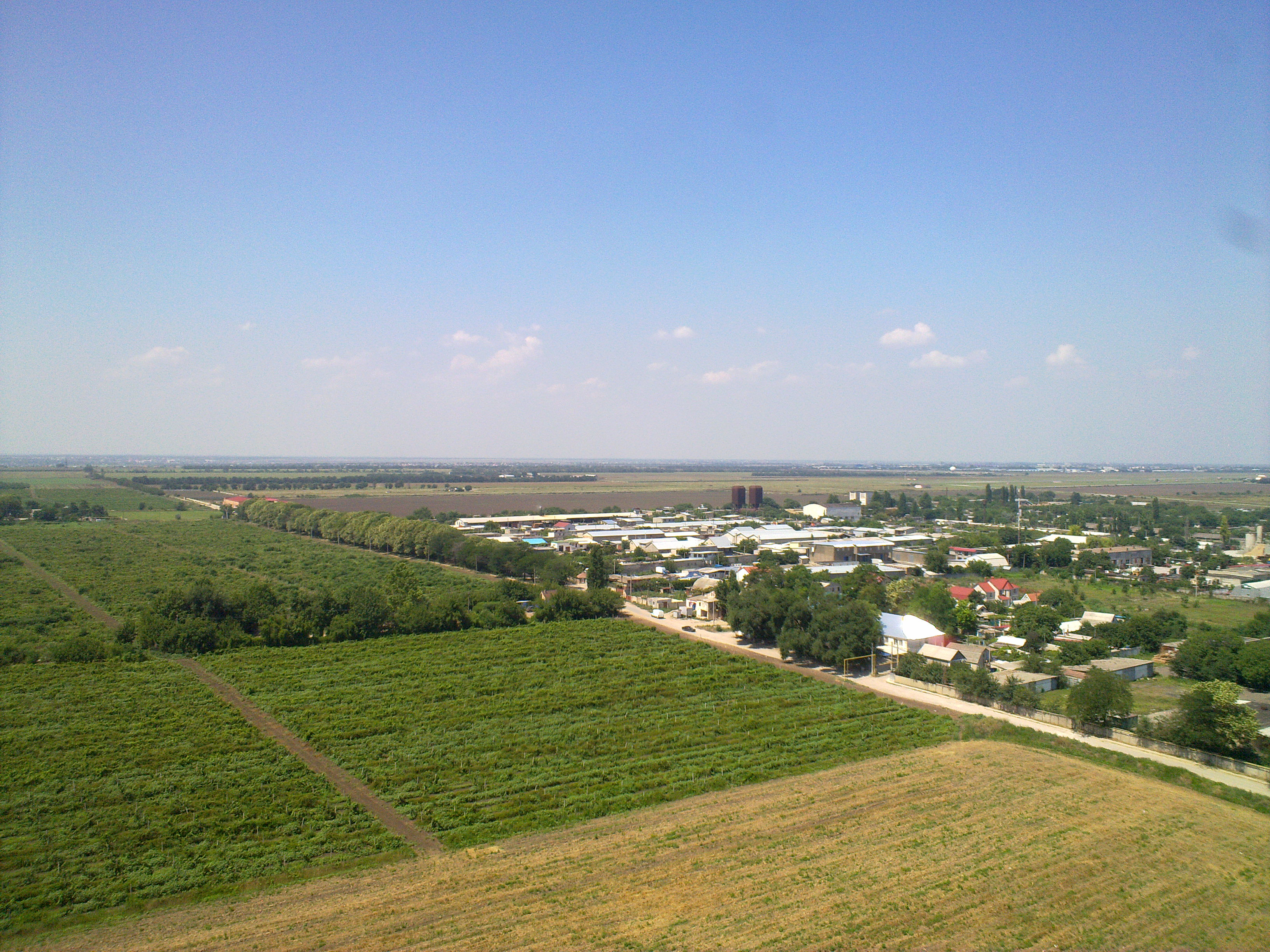 Вигляд на поля з даху будинку №6 житлового масиву Райдужний